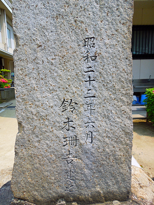 鈴木三重吉13回忌に、鈴木家の菩提寺である長遠寺に建立された墓碑（裏面）